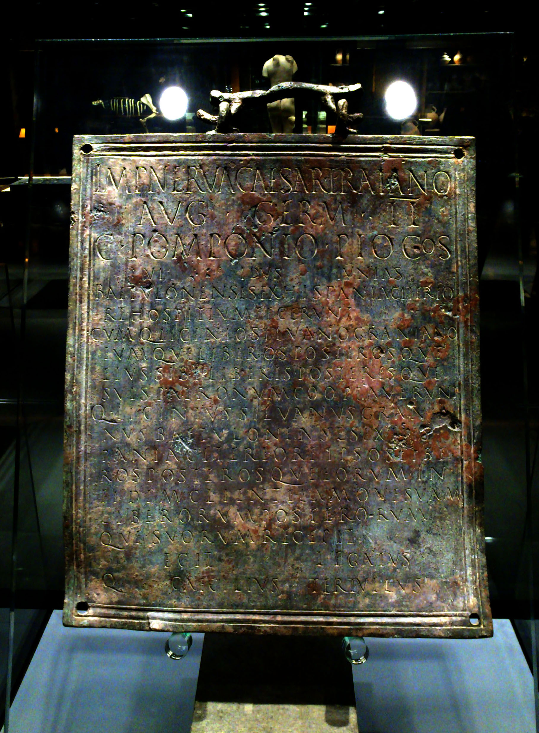 La Tabula Hospitalis de la ciutat romana de Baetulo. Trobada per Joaquim Font i Cussó entre 1934-1936.